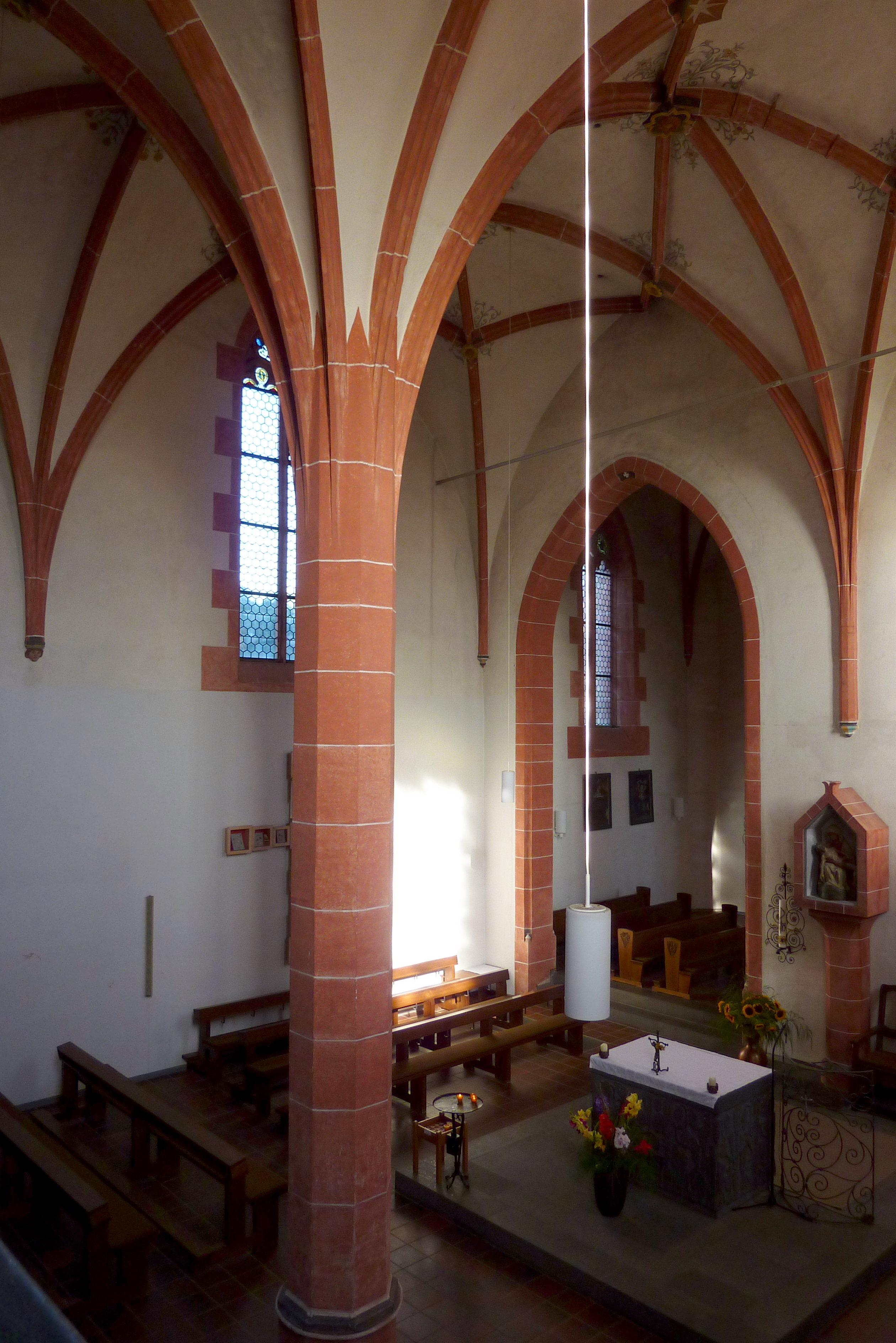 Katholische Wallfahrtskirche Mater Dolorosa in Driesch, einem Ortsteil von Lutzerath im Landkreis Cochem-Zell (Rheinland-Pfalz), achteckige Mittelstütze mit Rippengewölbe